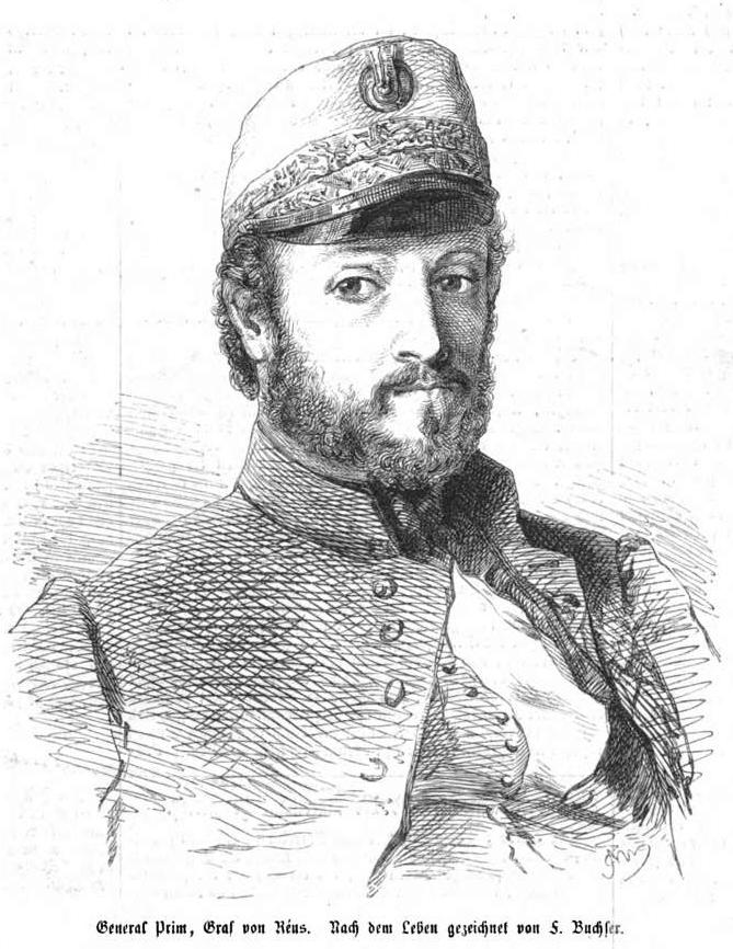 Juan Prim, span. General, 1862.